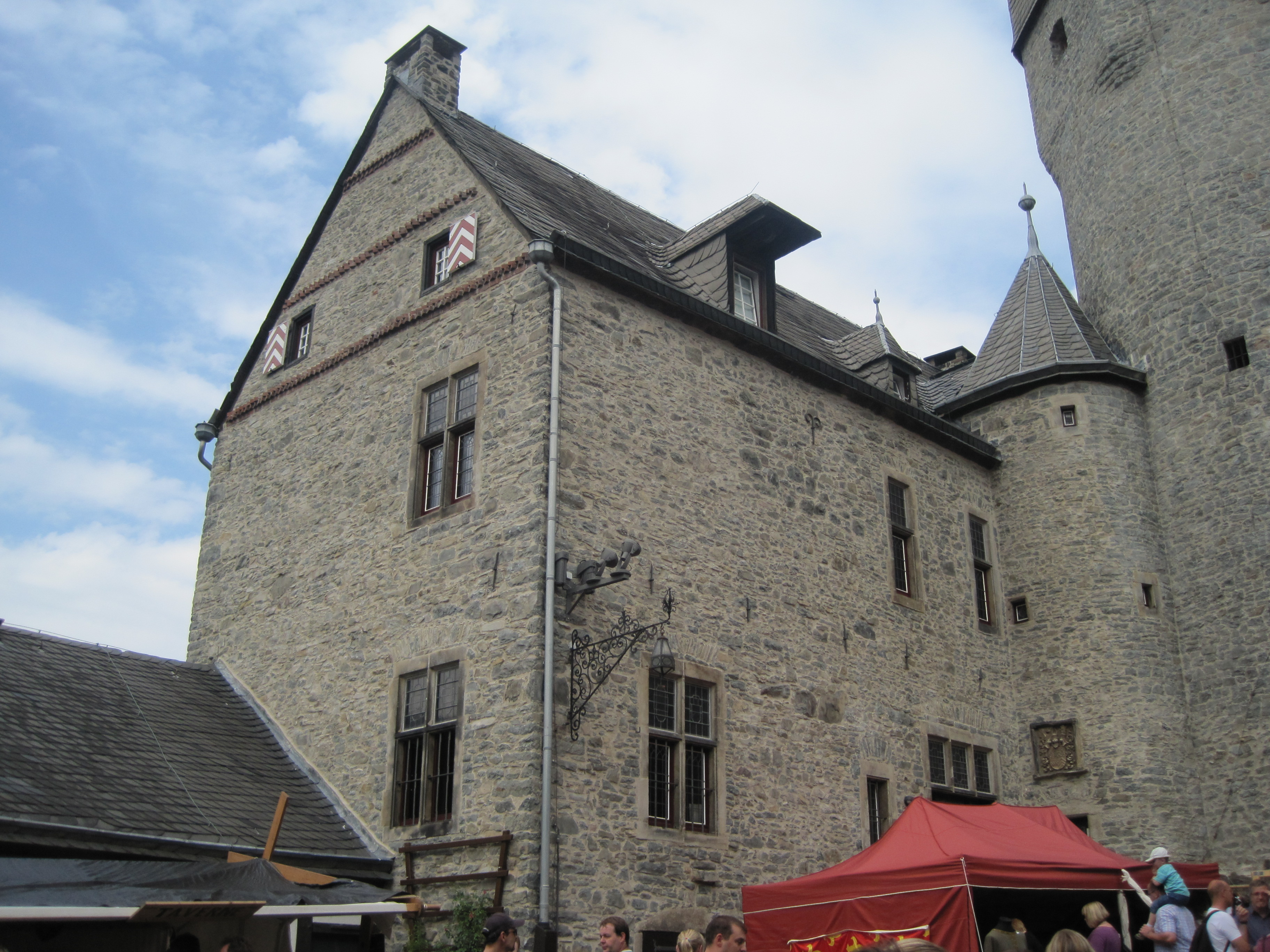 Dieses Foto zeigt den Palas auf Burg Altena, bis auf die fehlende Außentreppe baugleich zum Palas auf Burg Mark zu Hamm.